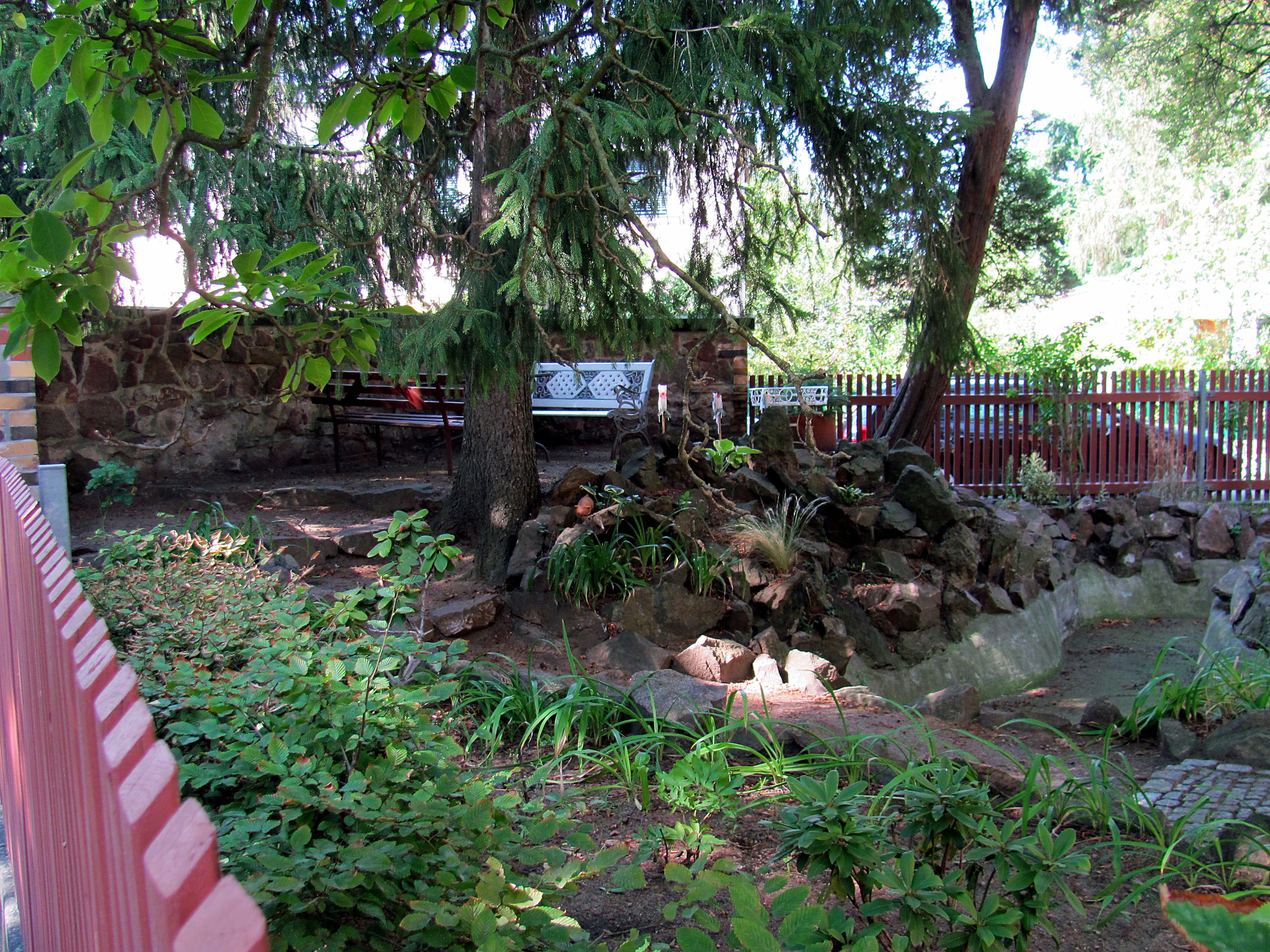 Radebeul Villa Marianne: Eckhügel mit Gartenteich